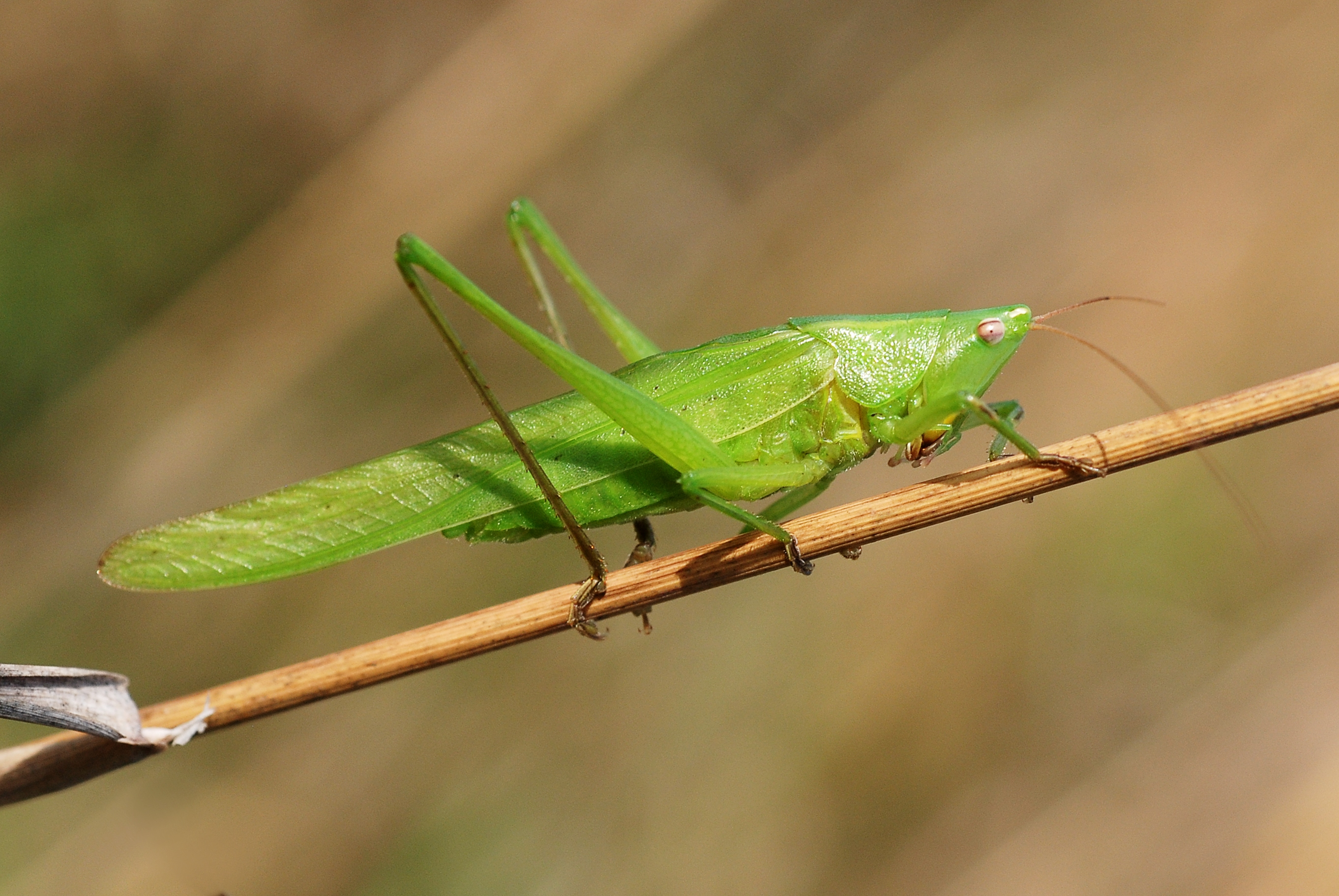 Ruspolia nitidula male